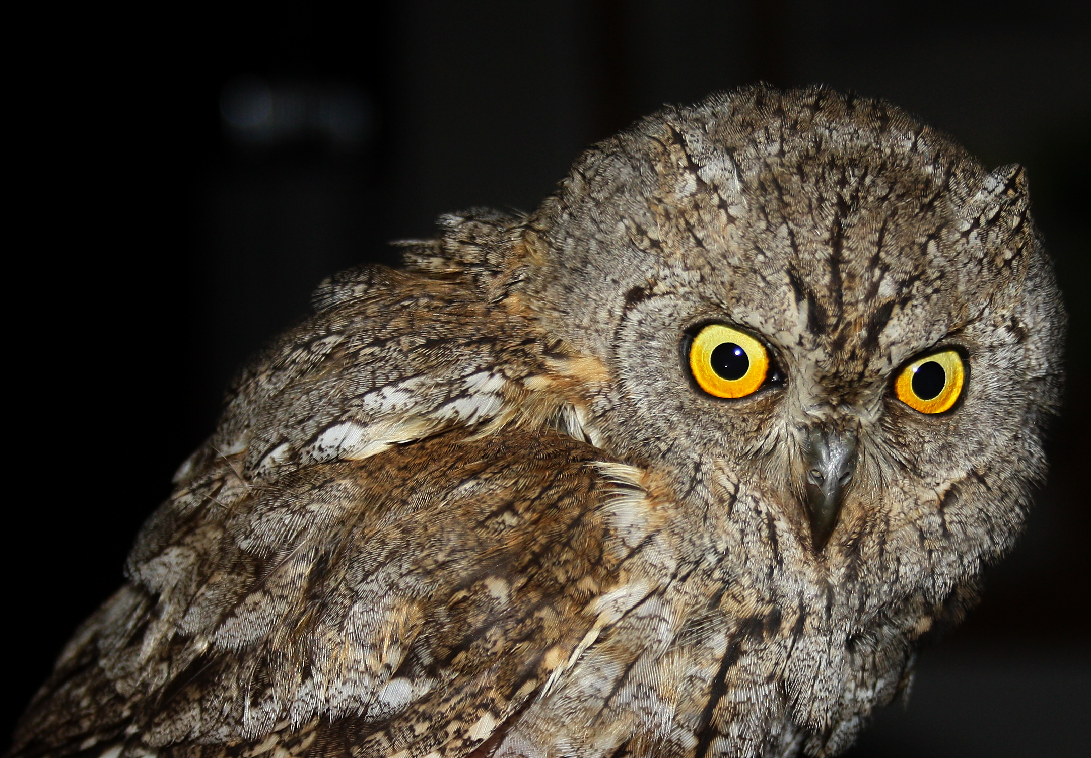 Fotografija je nastala u prirodnom parku Ebro Delta/Natural Park u Spaniji.